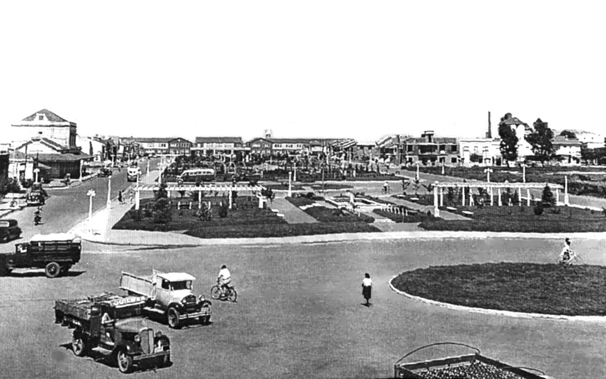 Avenida San Martin y Sáenz Peña, en la ciudad de Junín, en 1952. Al centro, la actual plaza Fuerzas Armadas. A la izquierda, antigua terminal de ómnibus.